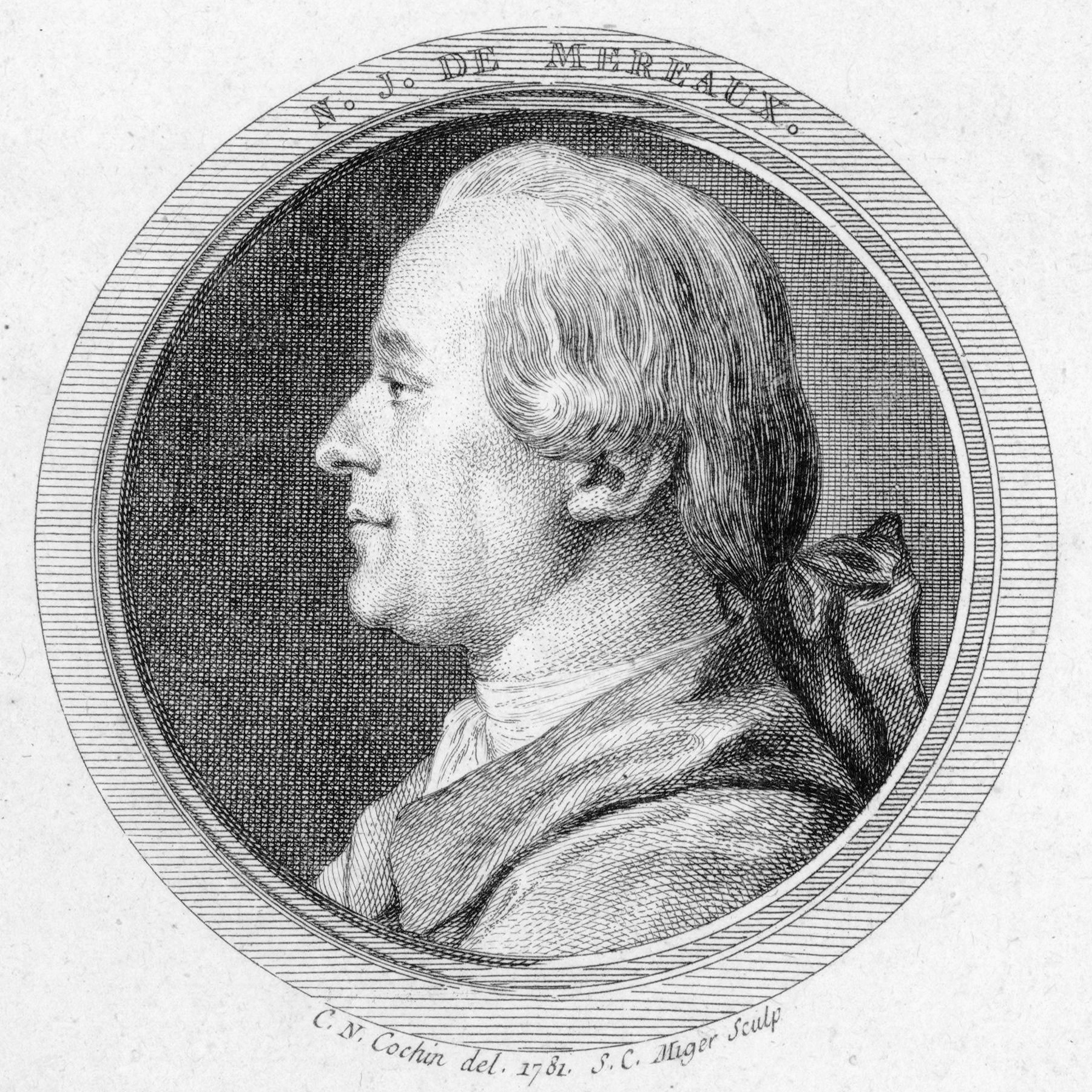 Depicted person: Nicolas-Jean Le Froid de Méreaux